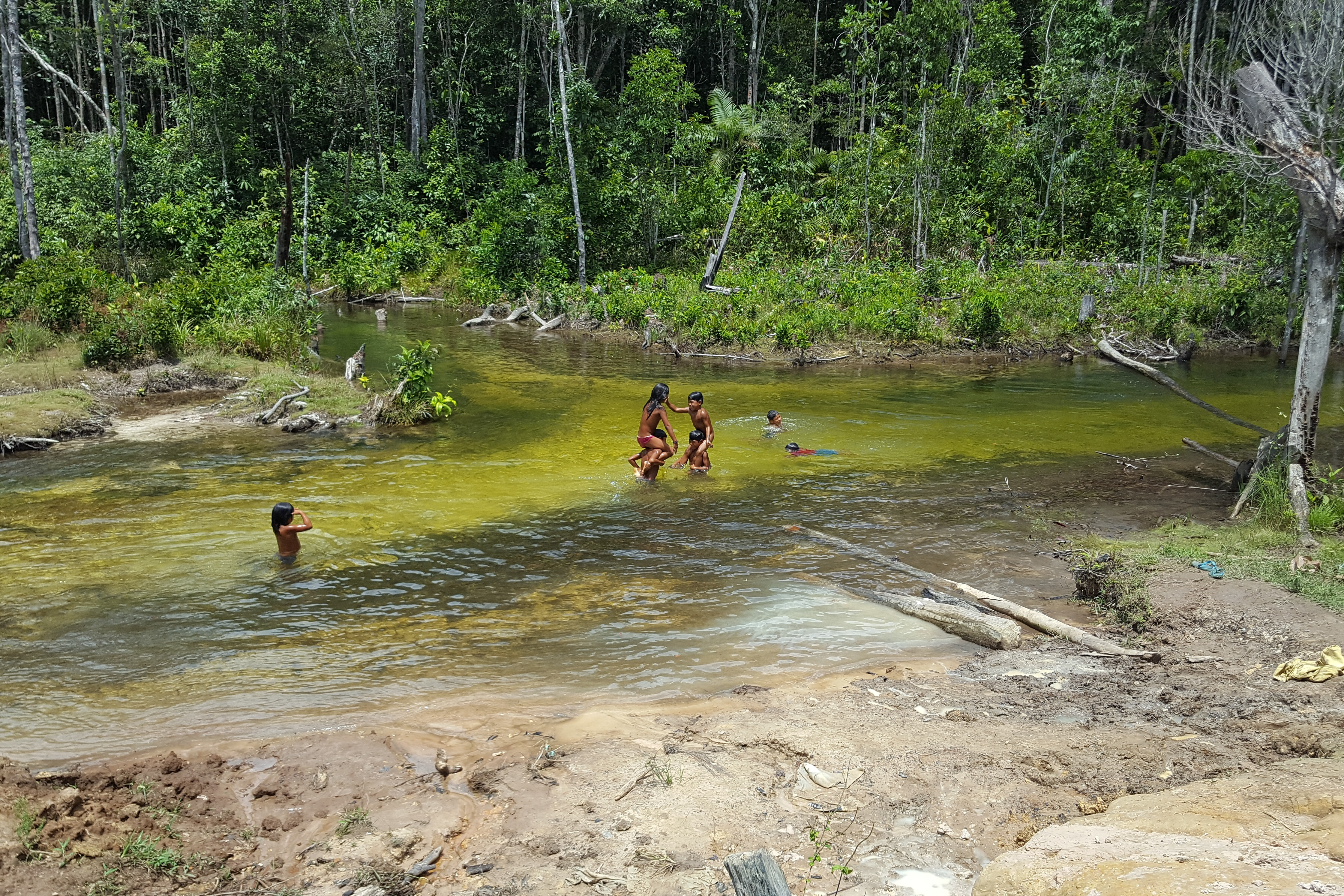 Crianças Nambikwara brincando, Mato Grosso em 2016